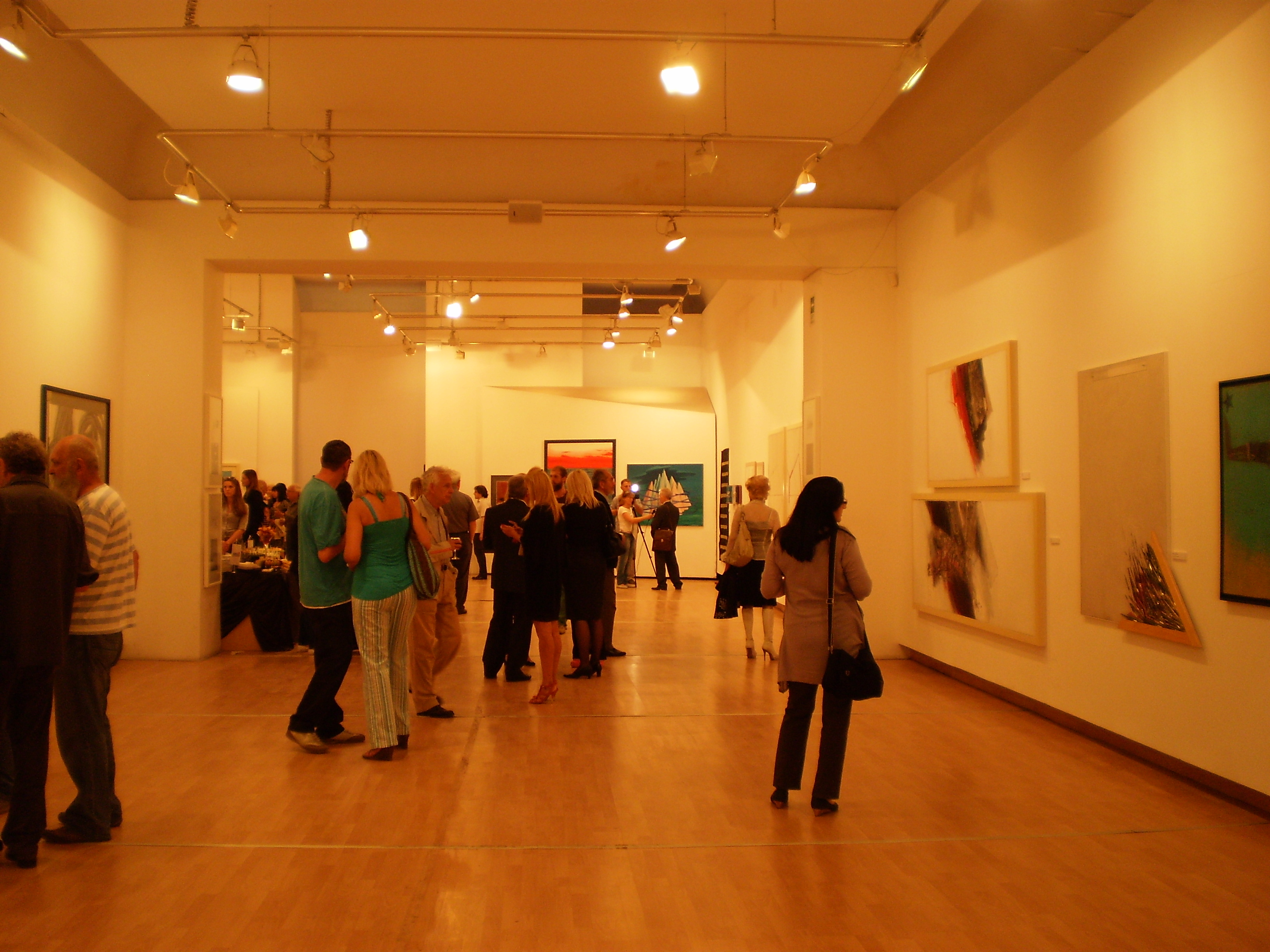 GSLU Niš, Galerija „Srbija“, enterijer, Niš